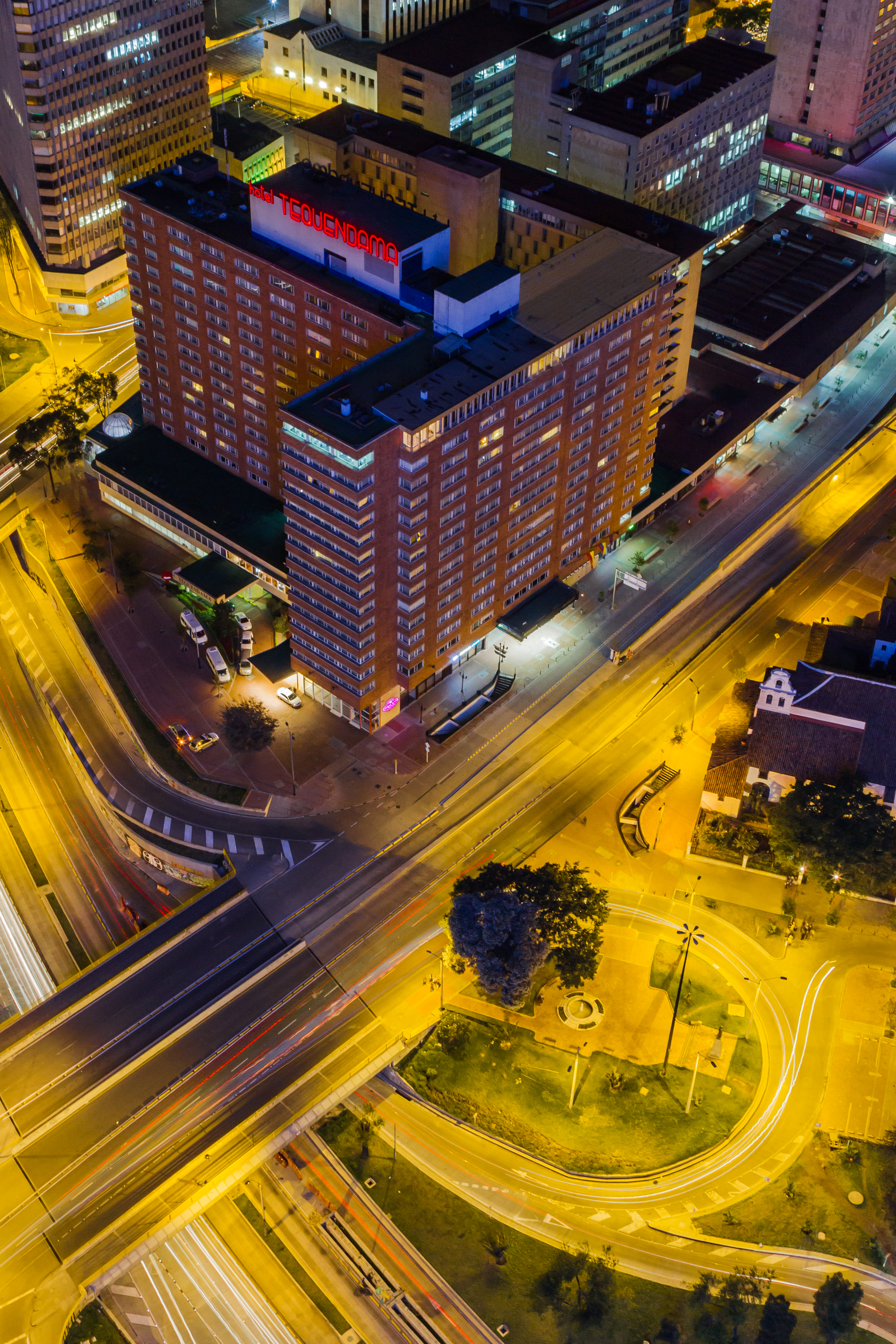 Edificio del Hotel Tequendama